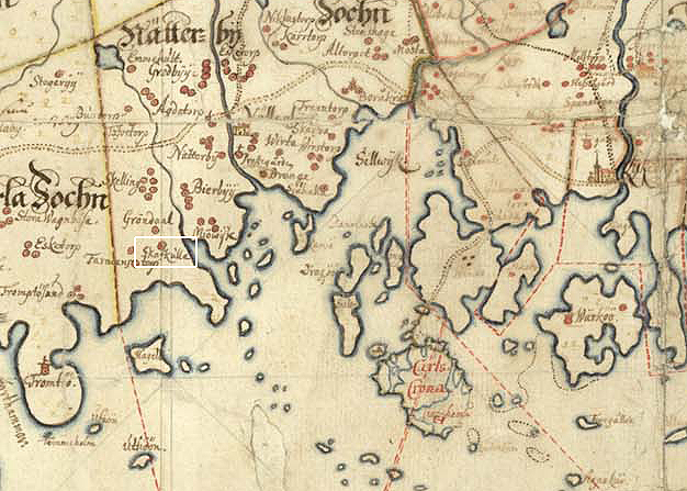 map